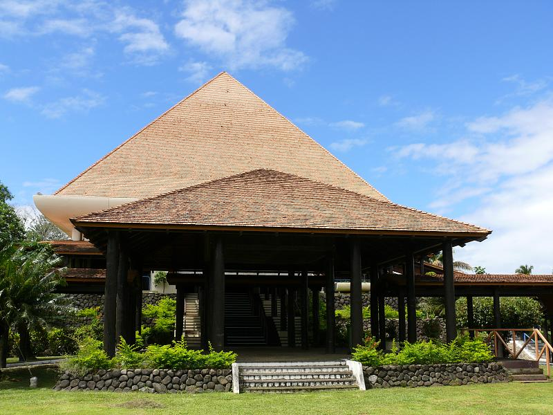 Fiji Parliament House, Suva